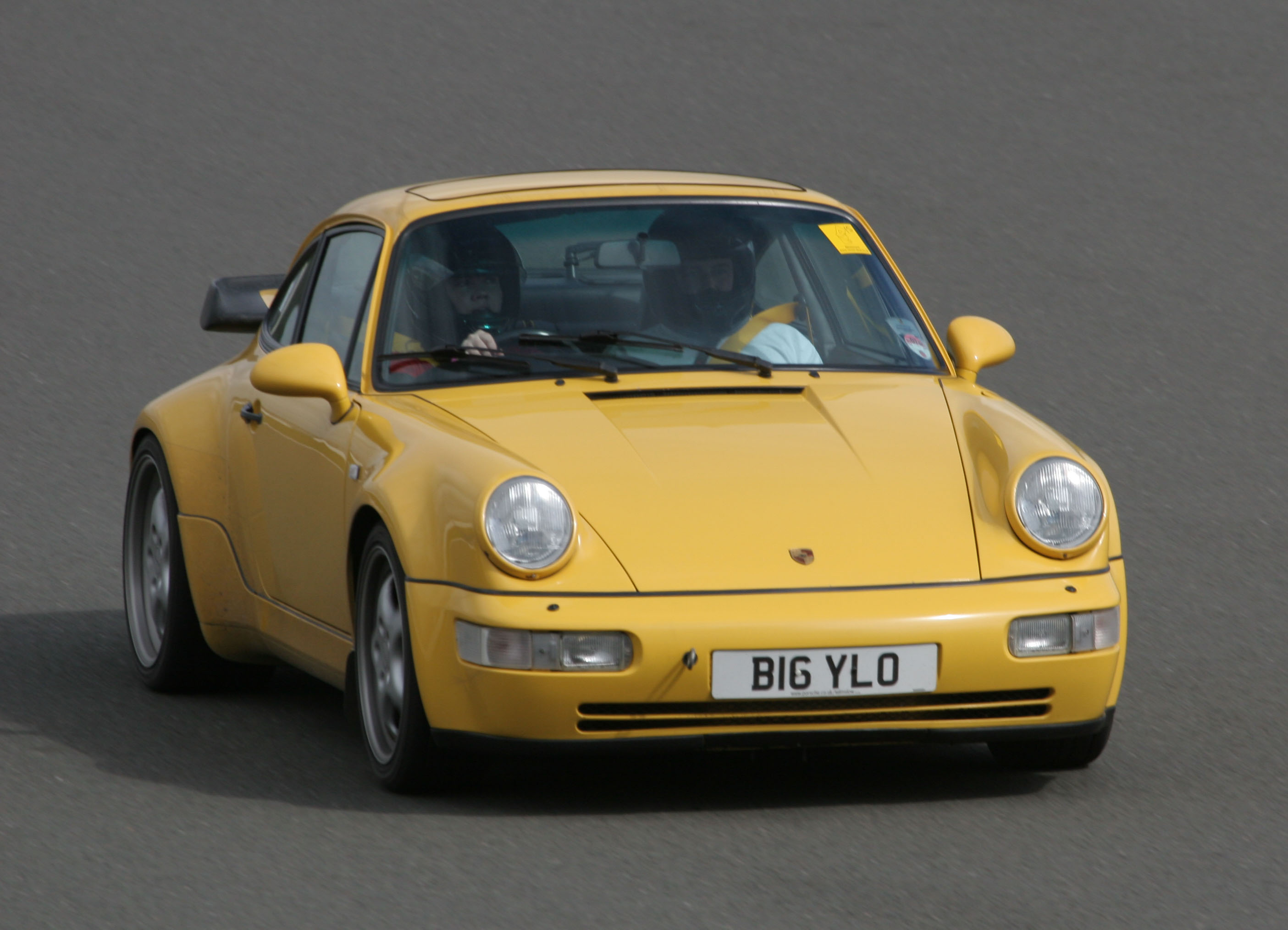 Porsche